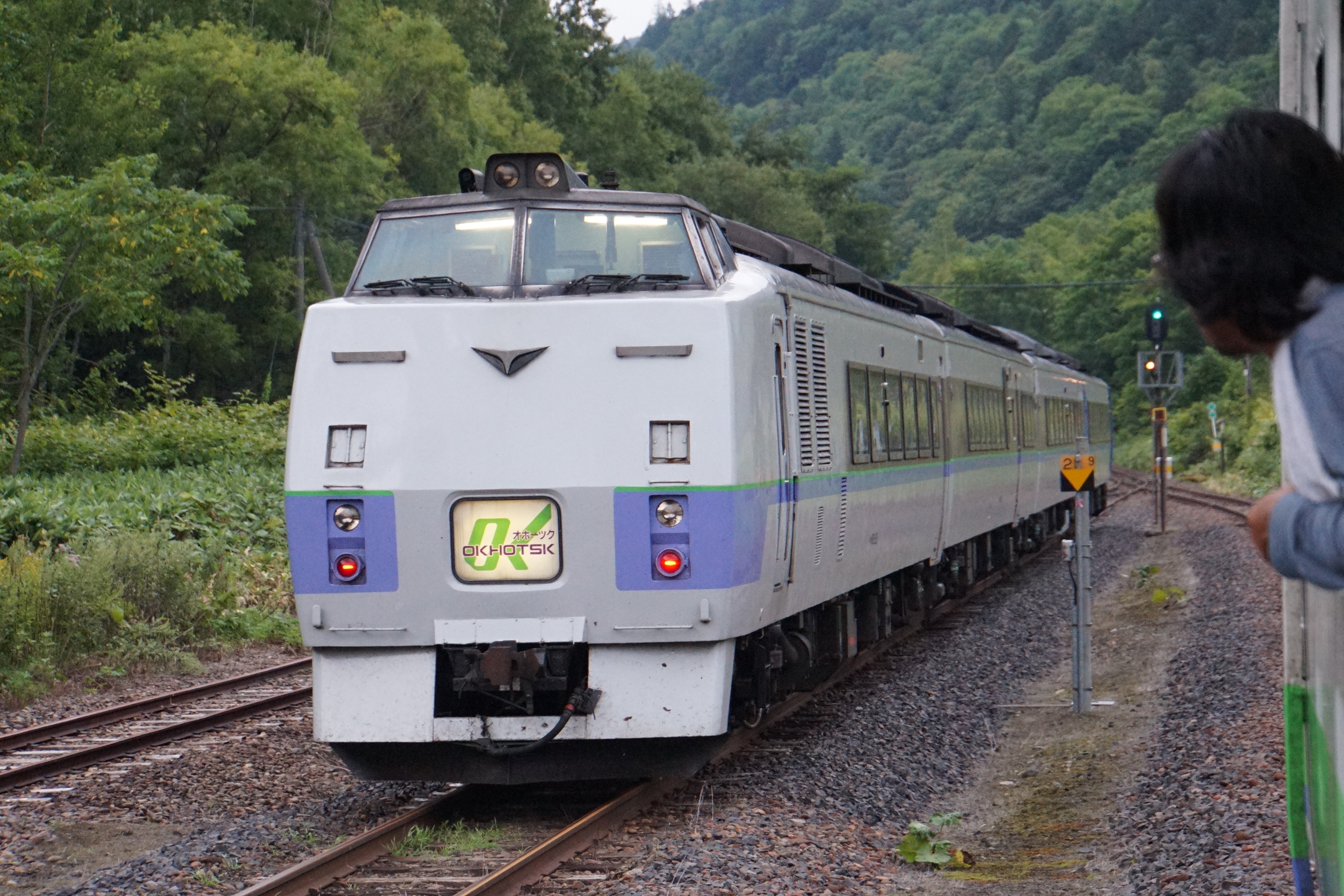 信号所を通過する特急オホーツク5号。普通列車（4620D）との交換。（2016年8月19日）